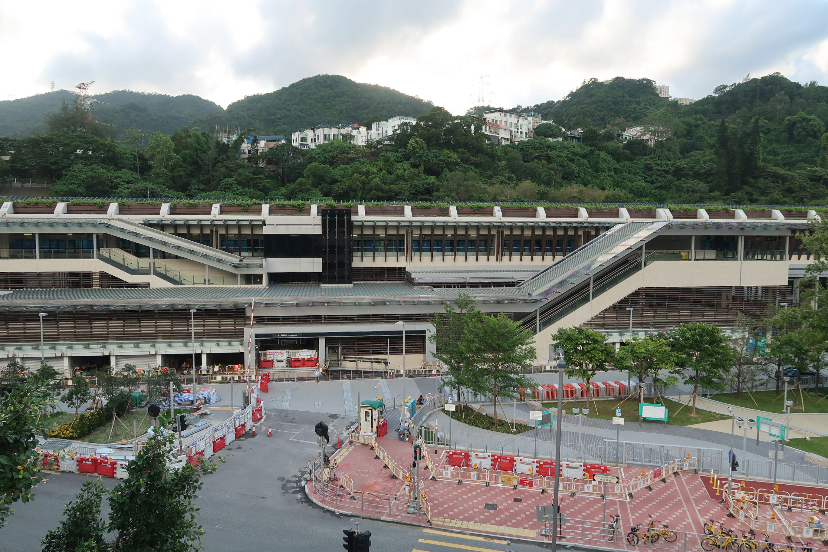 Hin Keng Station